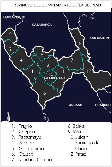 División política de La Libertad. la libertad prov, 333